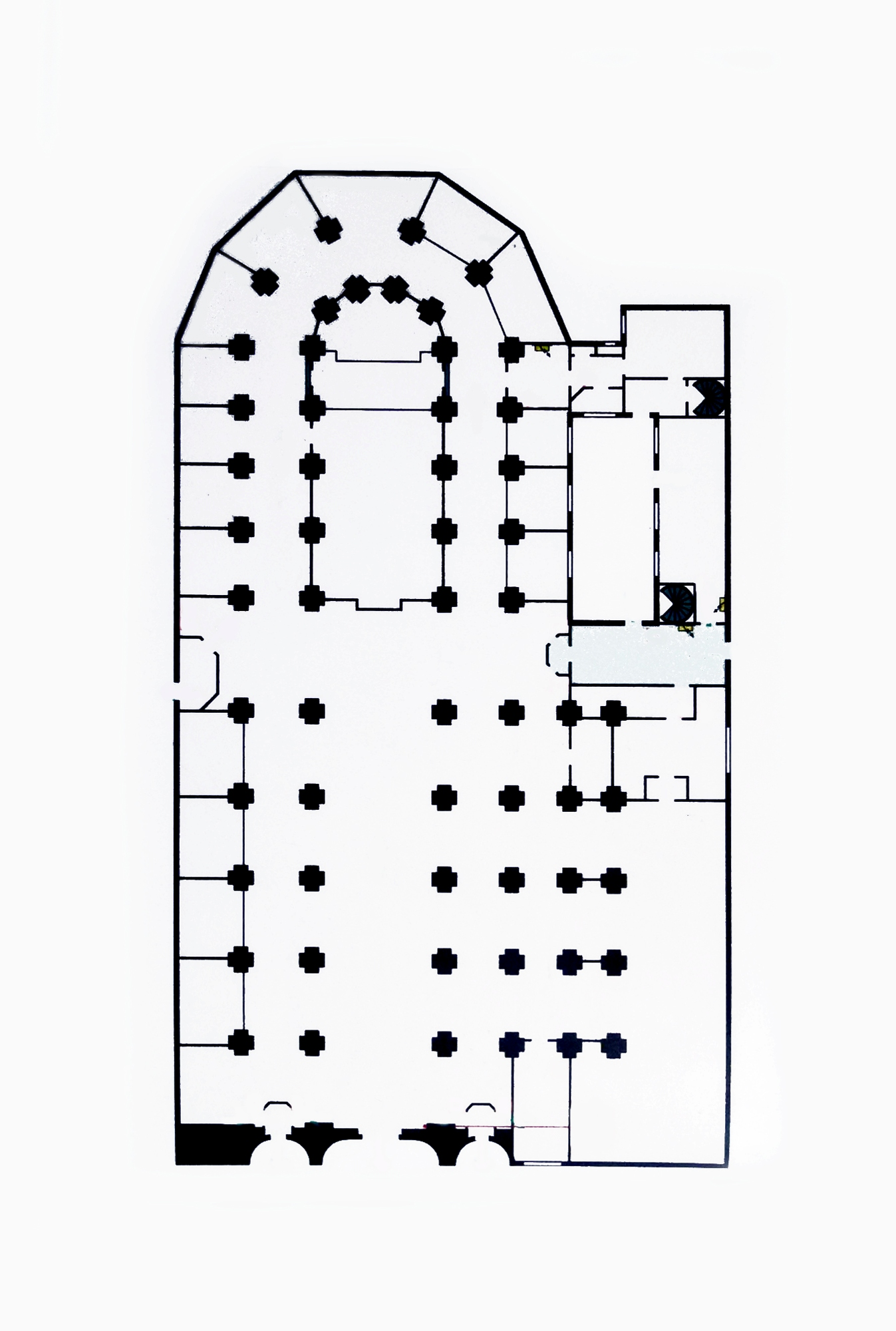 Plan de l'église Saint-Merri - Paris IV D'après le plan officiel affiché dans l'église.